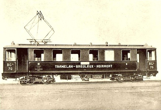 Personentriebwagen BCe 4/4 Nr. 70 der Chemin de fer électrique Tramelan - Breuleux - Noirmont (TBN). Die Triebwagen wurden von der Schweizerischen Wagonfabrik in Schlieren-Zürich (SWS) und von Brown, Boveri & Cie in Baden (BBC) geliefert. Sie besassen zwei sogenannte Maximum-Drehgestell mit einer Trieb- und einer Laufachse.